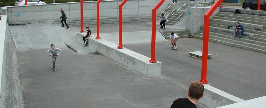 Skaterpark / flood water basin